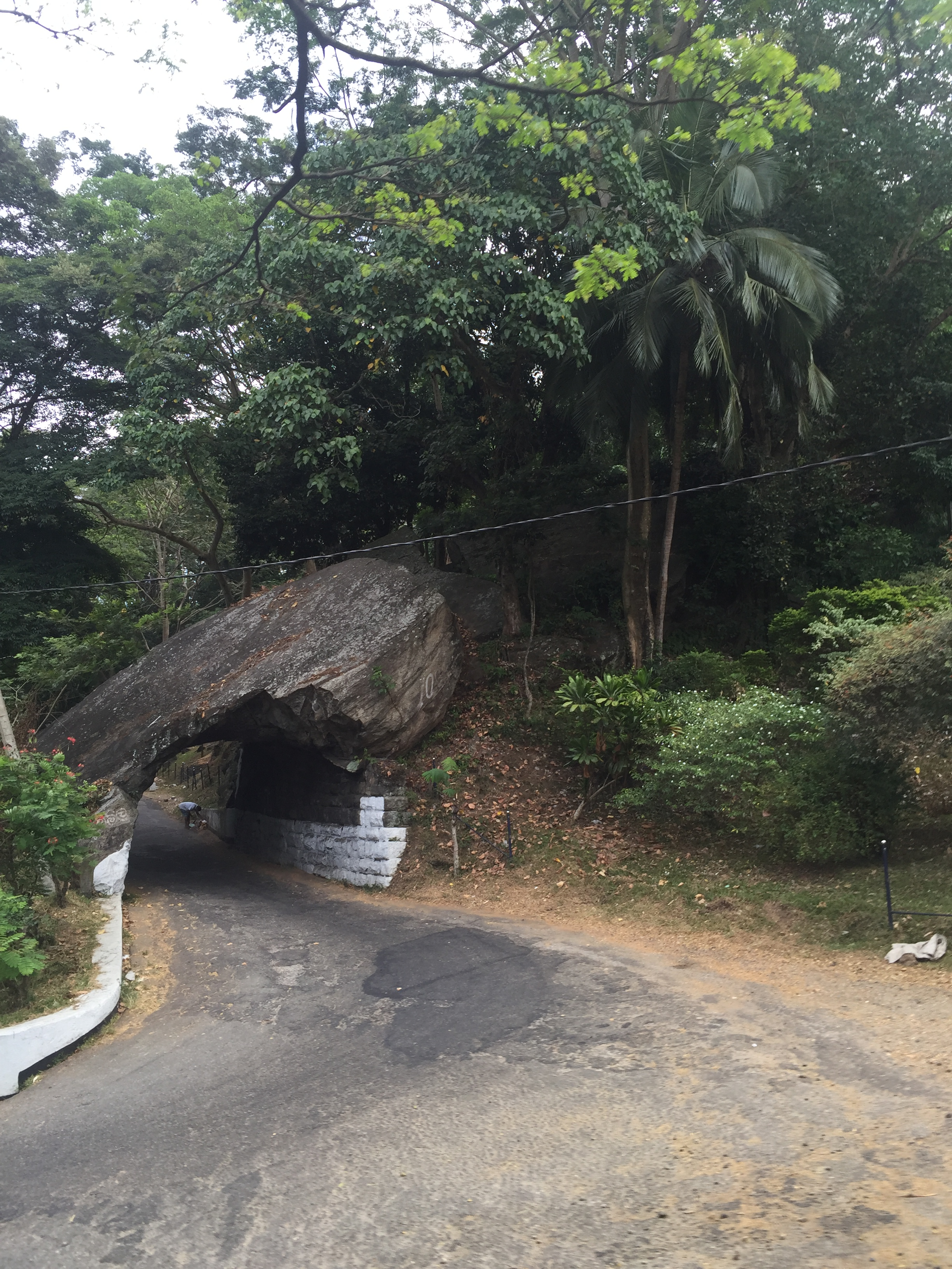 Kadugannawa, Sri Lanka